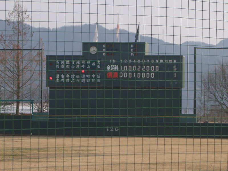 長野県中野市の中野市営野球場・スコアボード